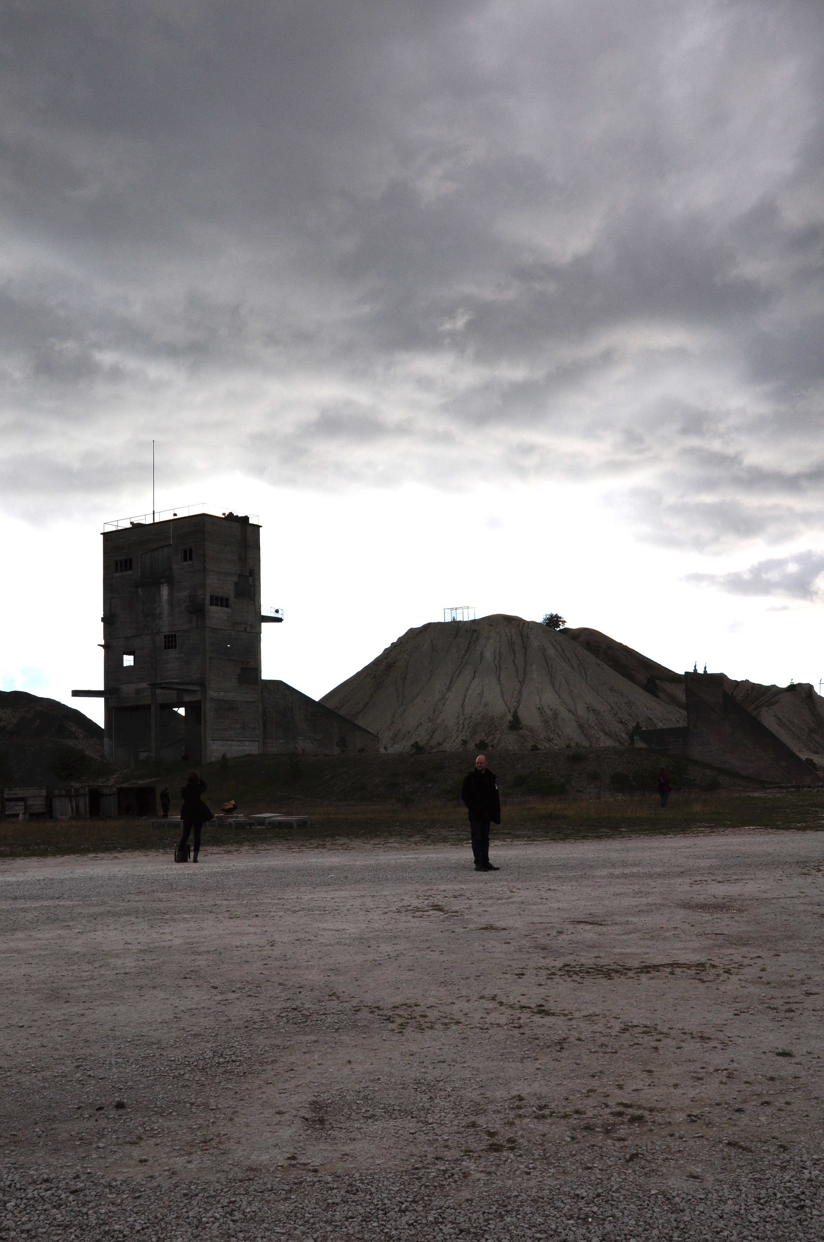 Furillen före detta kalkstensbrott och verkstadslokaler, Gotland.